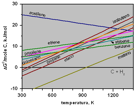 Diagram of the free energy of formation of hydrocarbons (weighed by the number of carbon atoms in the molecule). Used in petrochemistry for calculating the equilibrium concentrations of cracking step